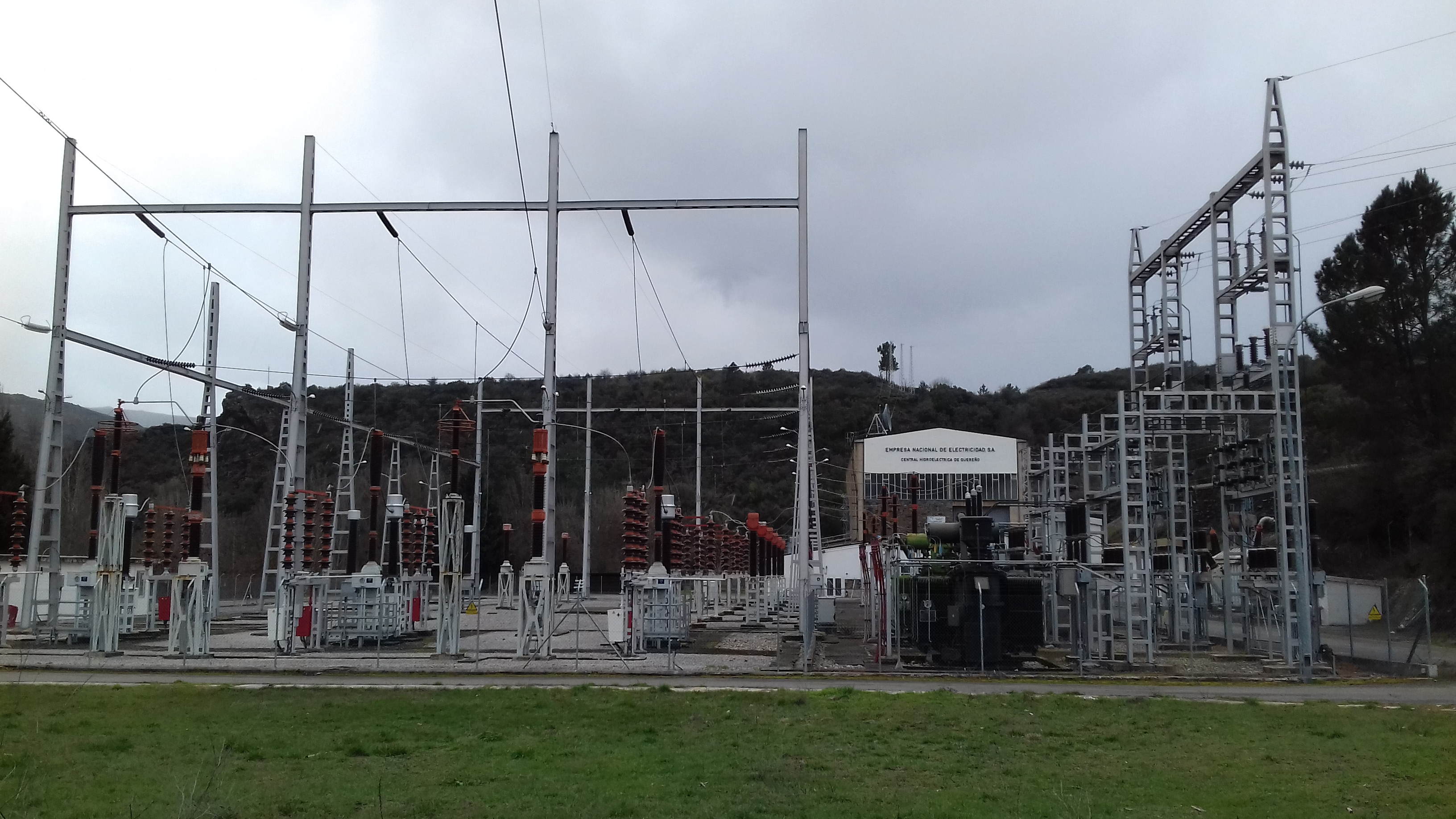 Crntral eléctrica Quereño, Rubiá